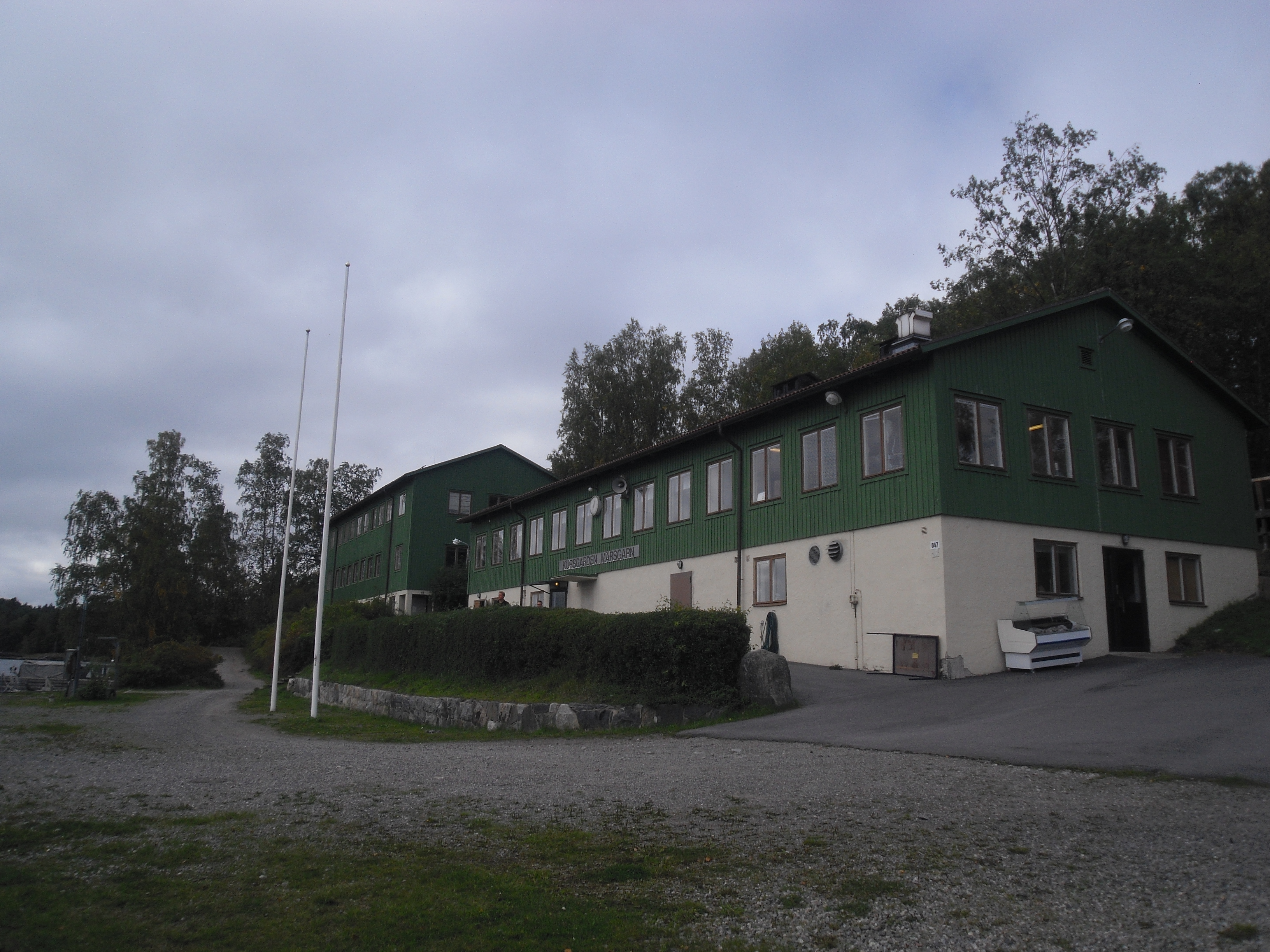 Kursgården, Märsgarn, Horsfjärden, Haninge kommun, Stockholms skärgård. Kursgården drivs av Sjövärnskåren.